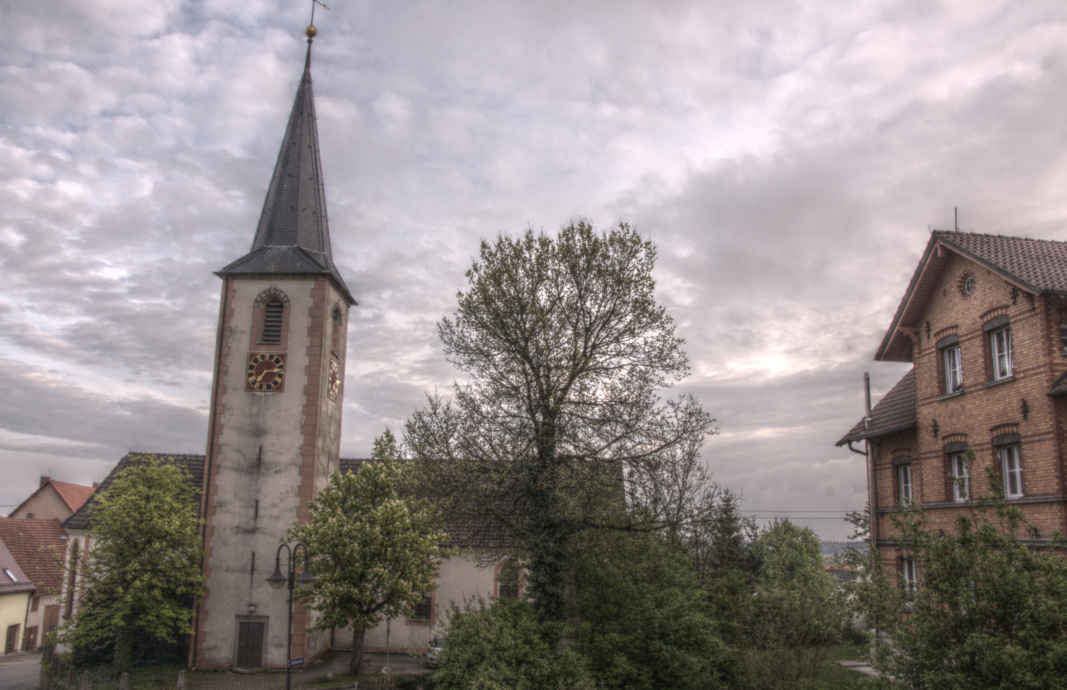 Neuhausen ob Eck, Gervasiuskirche, HDR-Bild